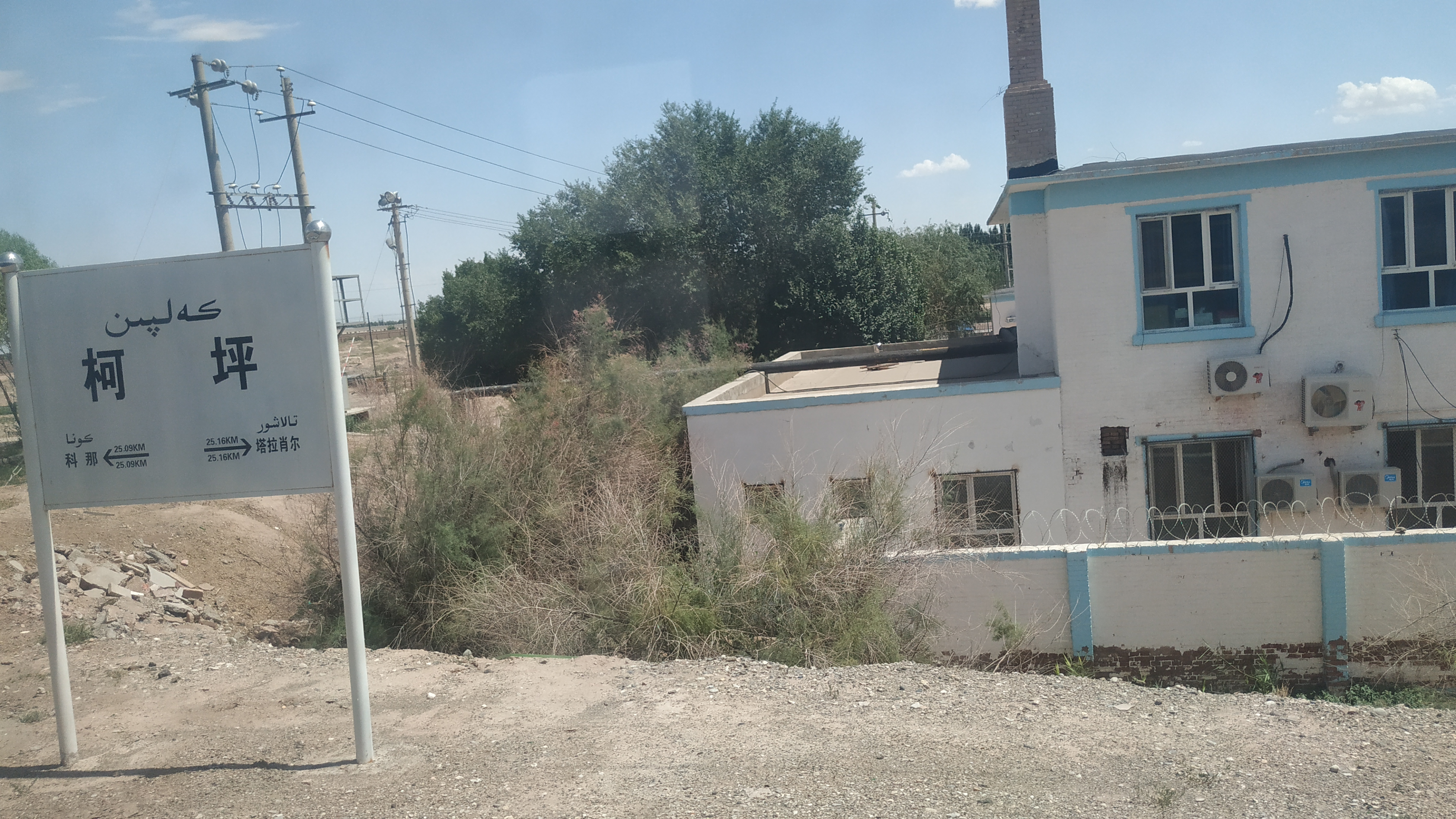 中文（中国大陆）: 柯坪站站牌及站房